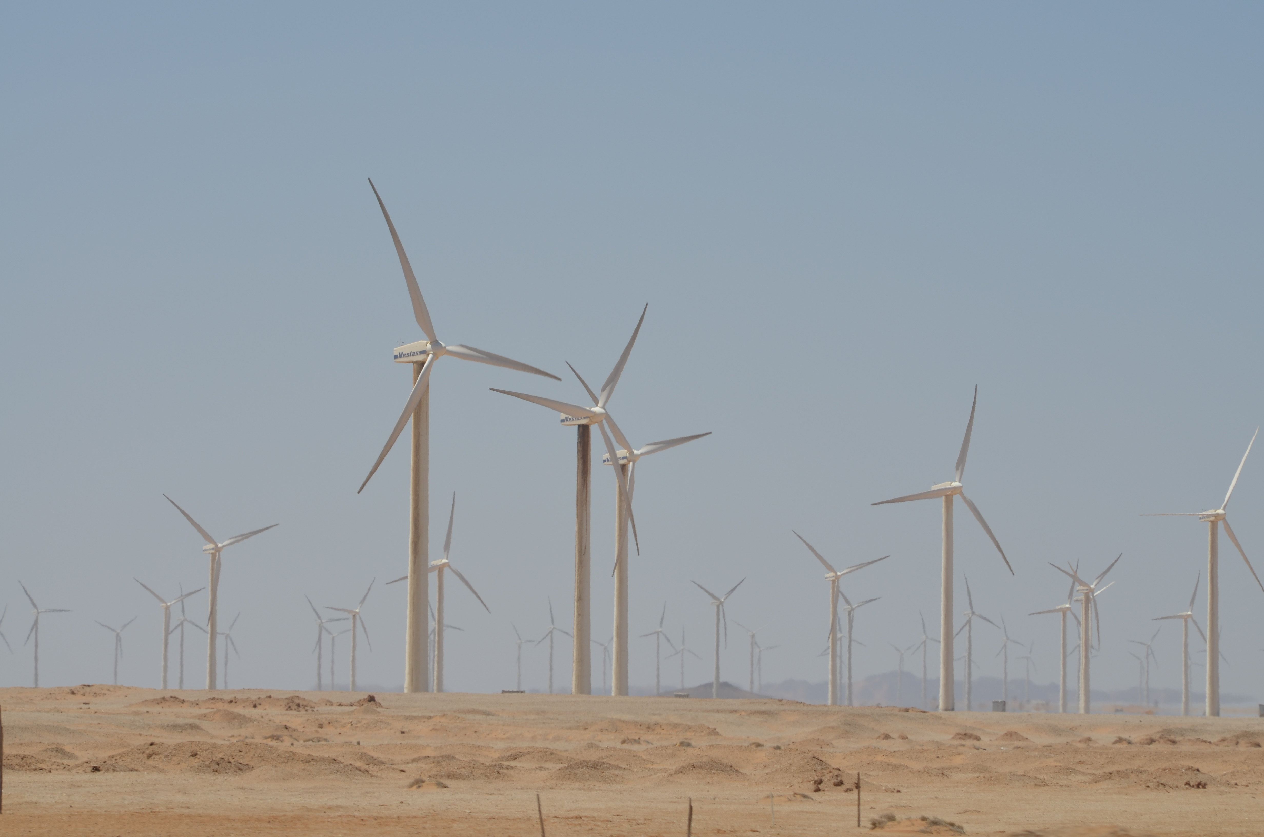 محطة الزعفرانة لتوليد الكهرباء من طاقة الرياح